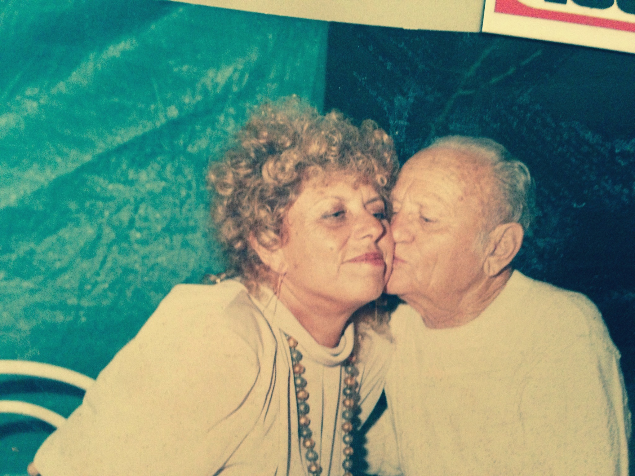 שולמית אלוני עם בעלה ראובן אלוני